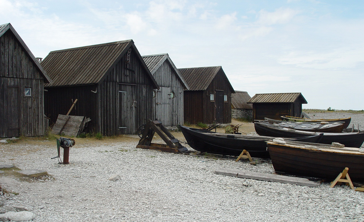 Fischerstelle auf Gotland: Helgumannens fiskeläger. Nordseite Fårö, nahe Naturschutzgebiet Langhammars